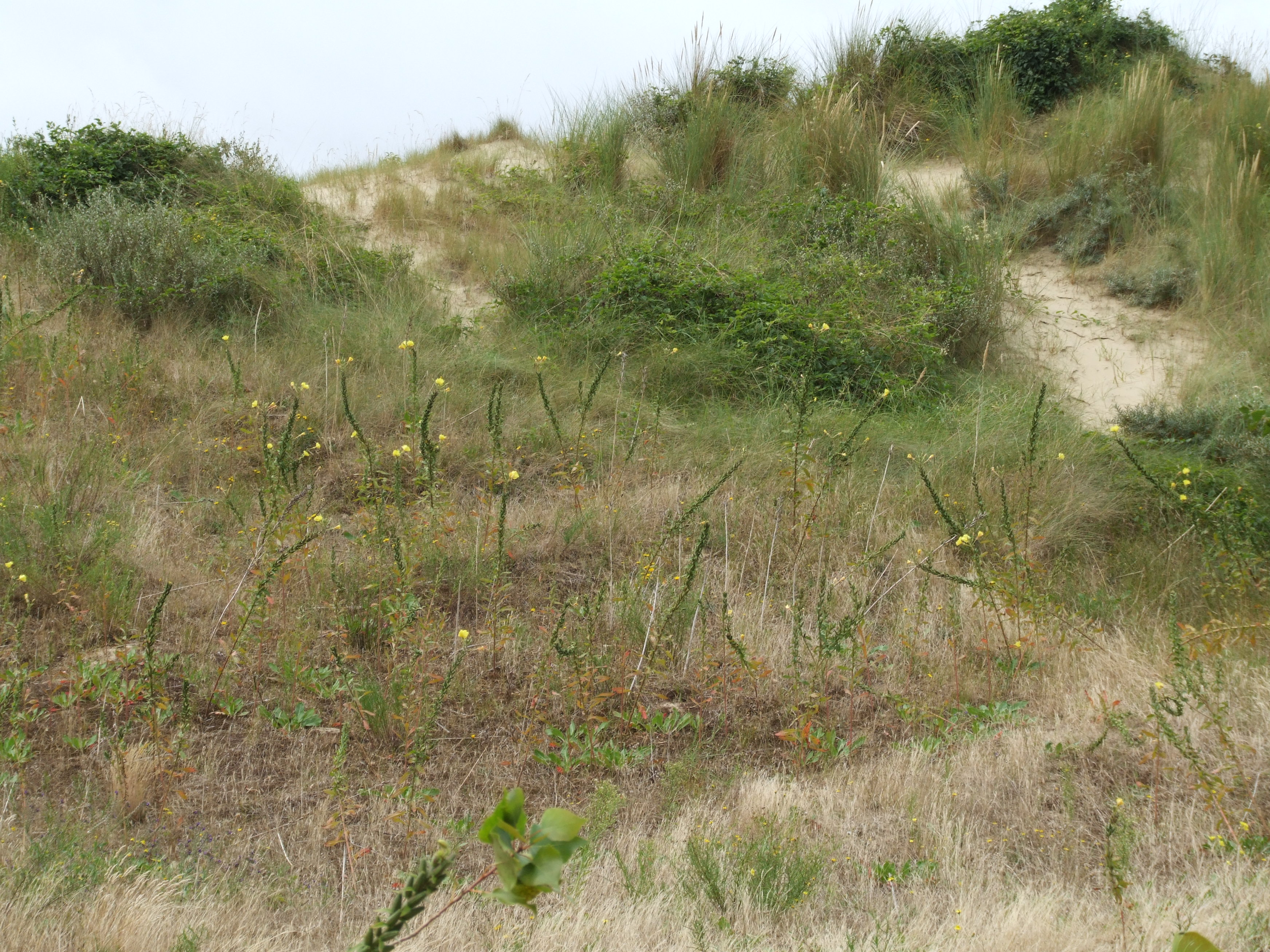 Bestand von Oenothera erythrosepala - Große Nachtkerze - Grote teunisbloem - l'Onagre à sépales striés de rouge - Evening Primrose -Ort: Dune du Perroquet, Bray-Dunes, Frankreich